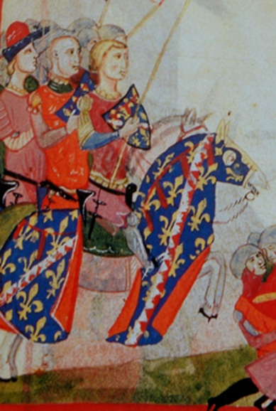 Felipe I de Tarento en la batalla de Montecatini (1315).